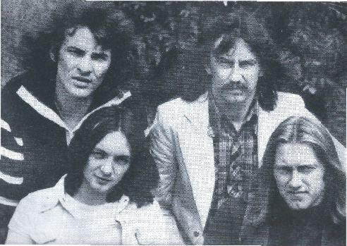 Polska grupa muzyczna KRAM - zdjęcie do plakatu PSJ, od lewej (tył): Ryszard Pokorski, Wojtek Nowak, przód: Andrzej Wilklisz, Roman Konigsmann